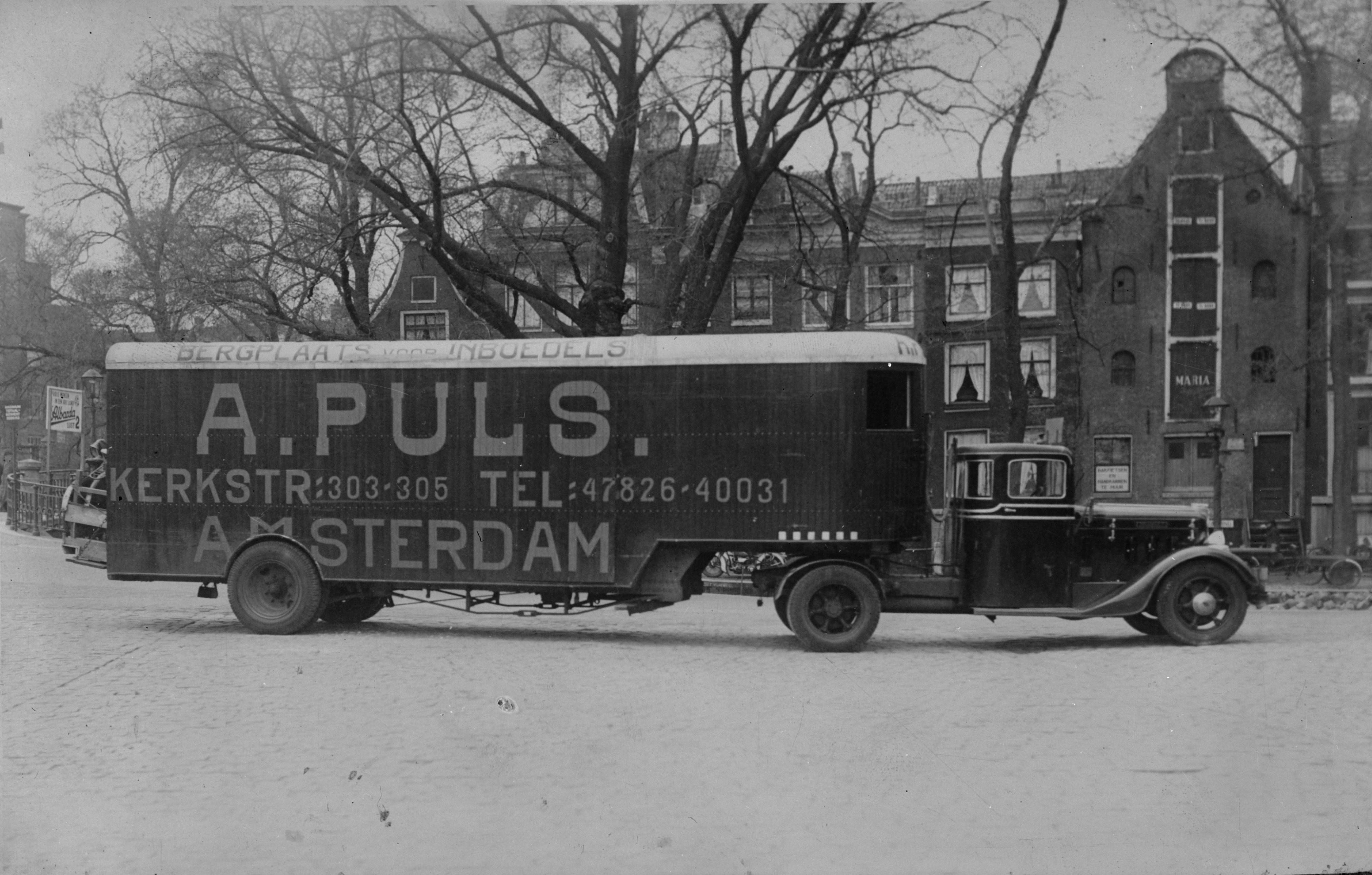 Verhuiswagen van de firma A. Puls. Repronegatief. Verhuisbedrijf Puls was berucht vanwege het transporteren van joodse inboedels tijdens de 2e wereldoorlog